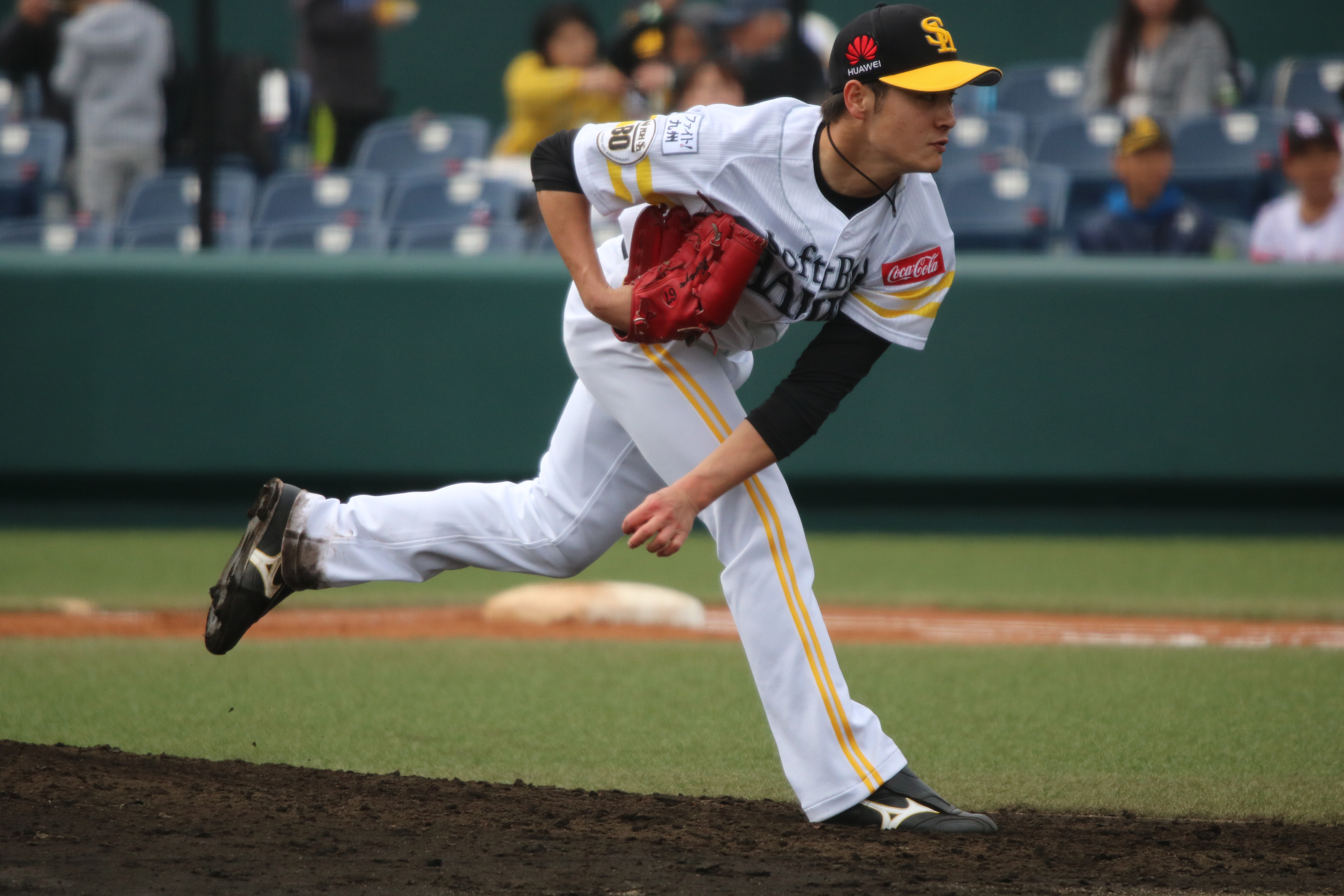 2018/4/6 タマホームスタジアム筑後